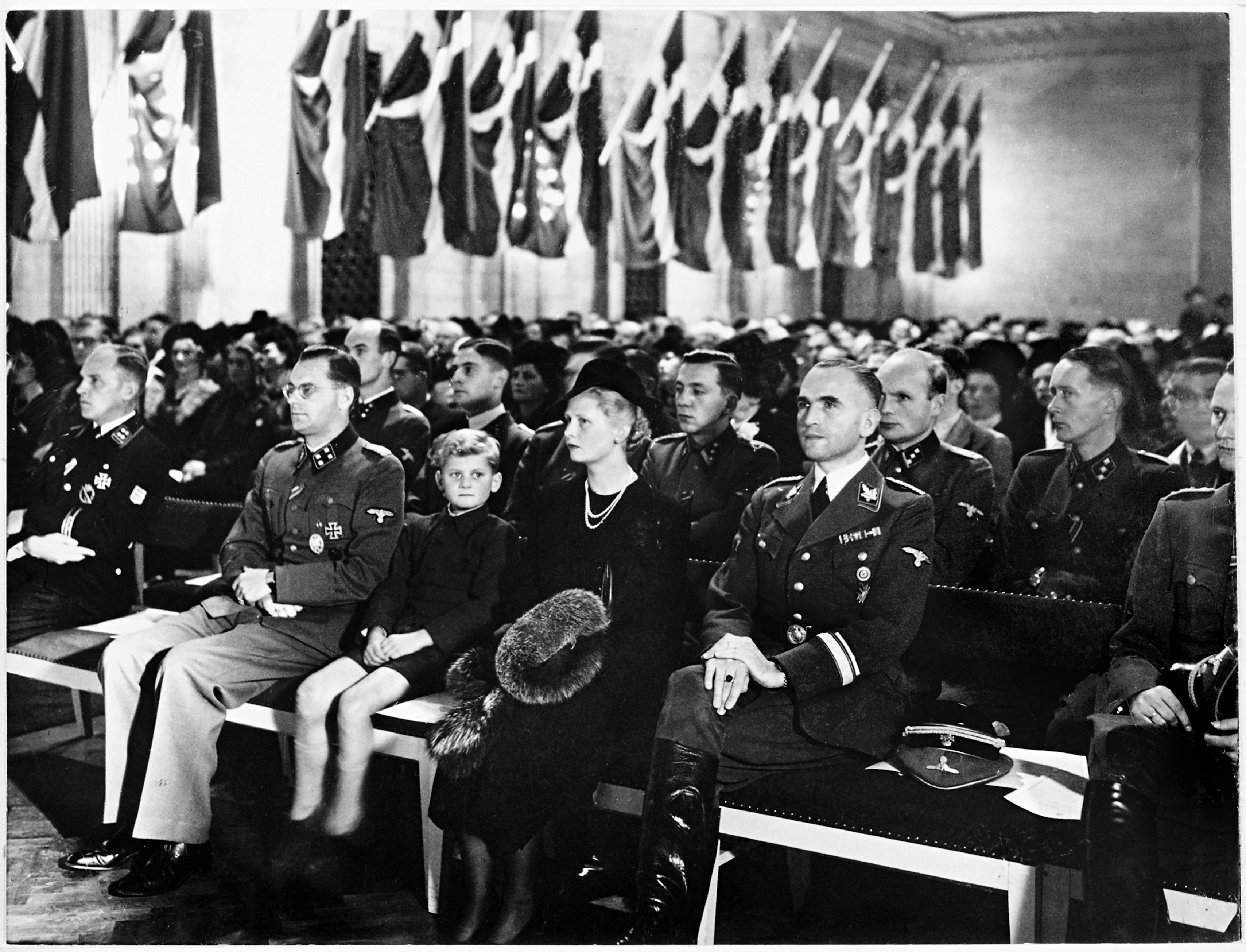 Schalburgkorpsets mindehøjtidelighed for faldne danske frivillige på Østfronten i Frimurerlogen d. 17.oktober 1943. Fra venstre ses Obersturmbannführer K. B. Martinsen, sturmbannführer Boysen, Fru von Schalburg m. søn og den tyske rigsbefuldmægtigede Werner Best. (Original billedtekst). PS. Werner Best har på pågældende tidspunkt rang af SS-Gruppenführer. Sted: Blegdamsvej, København Ø Dato: 17. Oktober 1943 Se flere billeder her: Rights: More about The Museum of Danish Resistance (Frihedsmuseet)